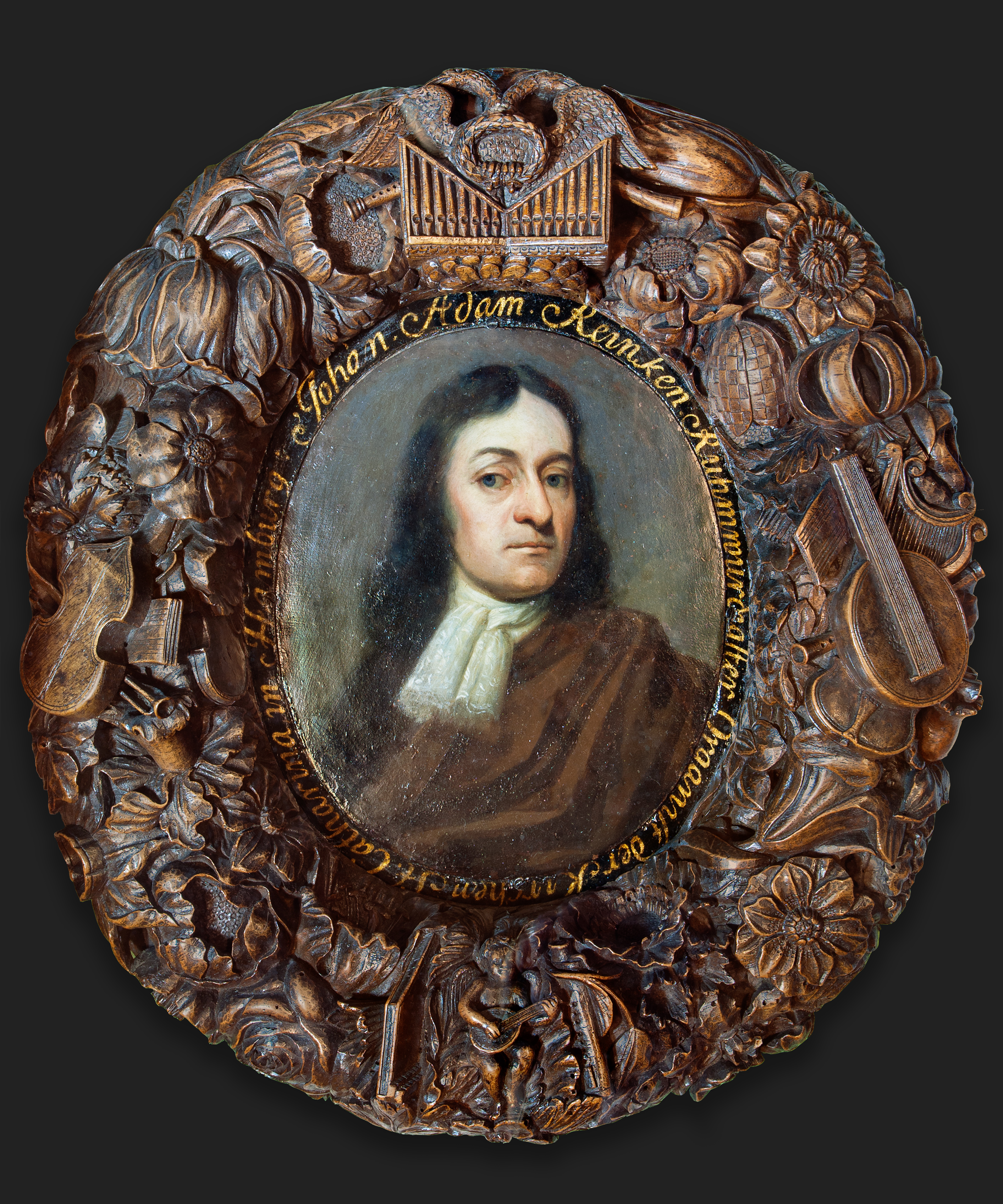 Porträt von Johann Adam Reincken. Gemälde von Gottfried Kniller, um 1674. Fotografiert im Museum für Hamburgische Geschichte, Hamburg, Deutschland mit freundlicher Unterstützung von Jom.